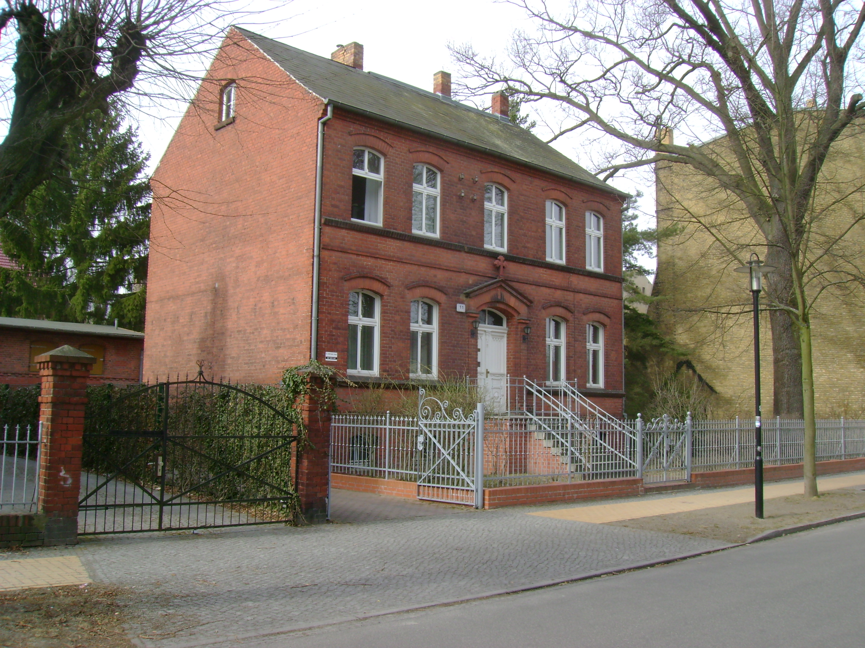 Denkmalgeschütztes katholisches Pfarrhaus in Velten Schulstraße 3